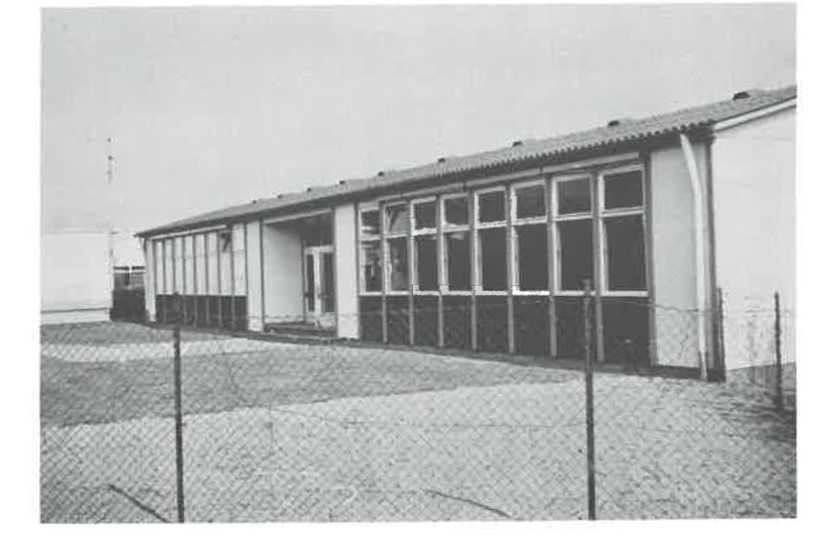 Vor der Gründung 1968 an bis Ende 1969 wurde in den Pavillonbauten Osterath, Görresstraße, unterrichtet.